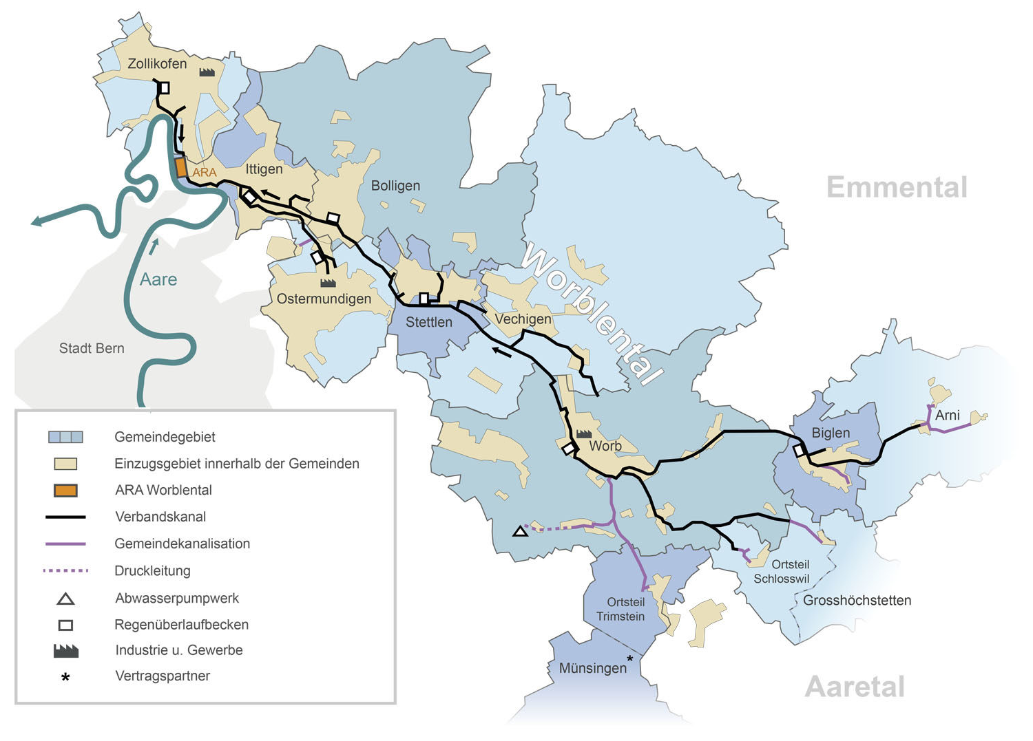 Einzugsgebiet und Kanalisationsnetz der ARA Worblental in Worblaufen